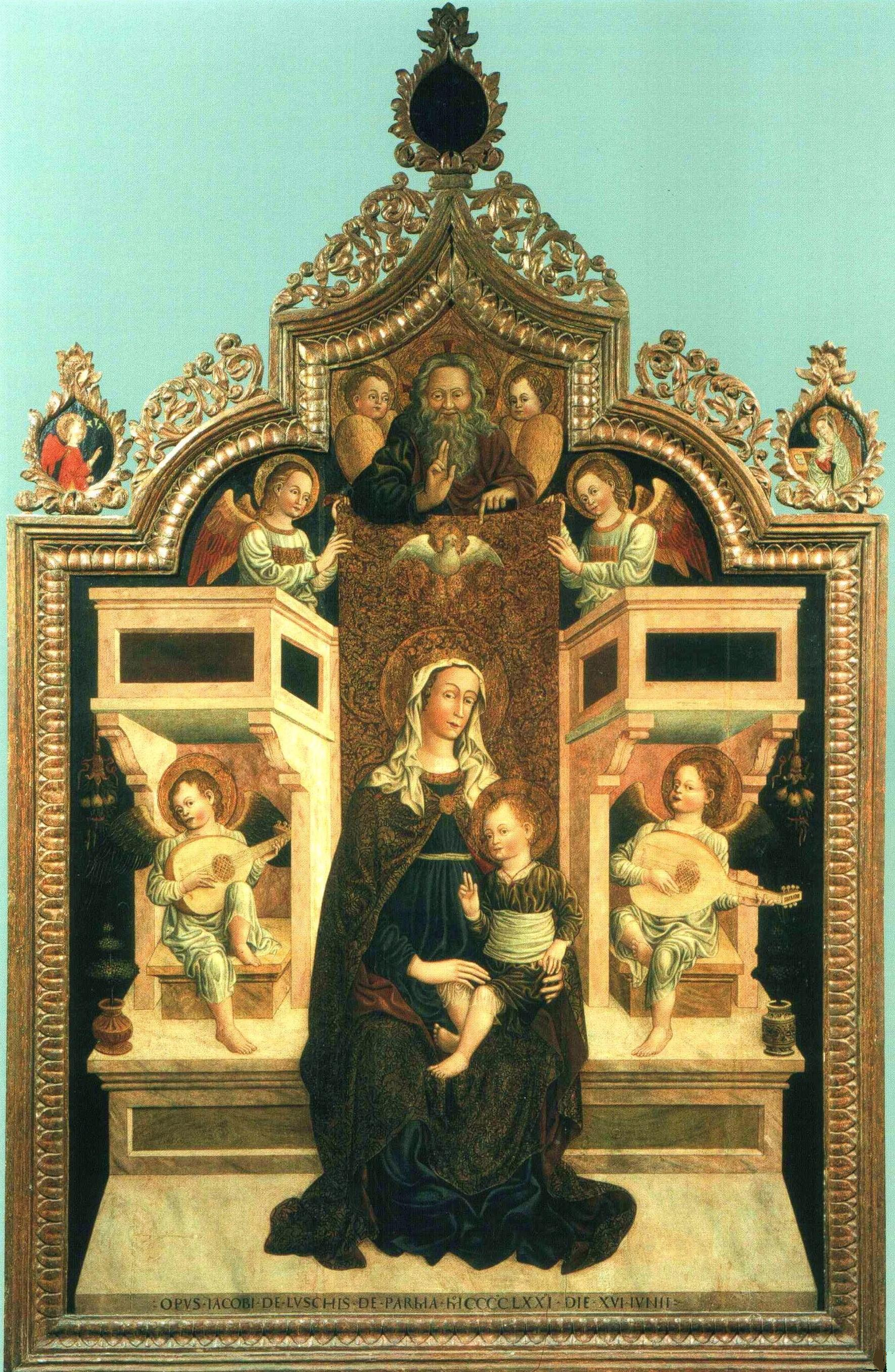 pala